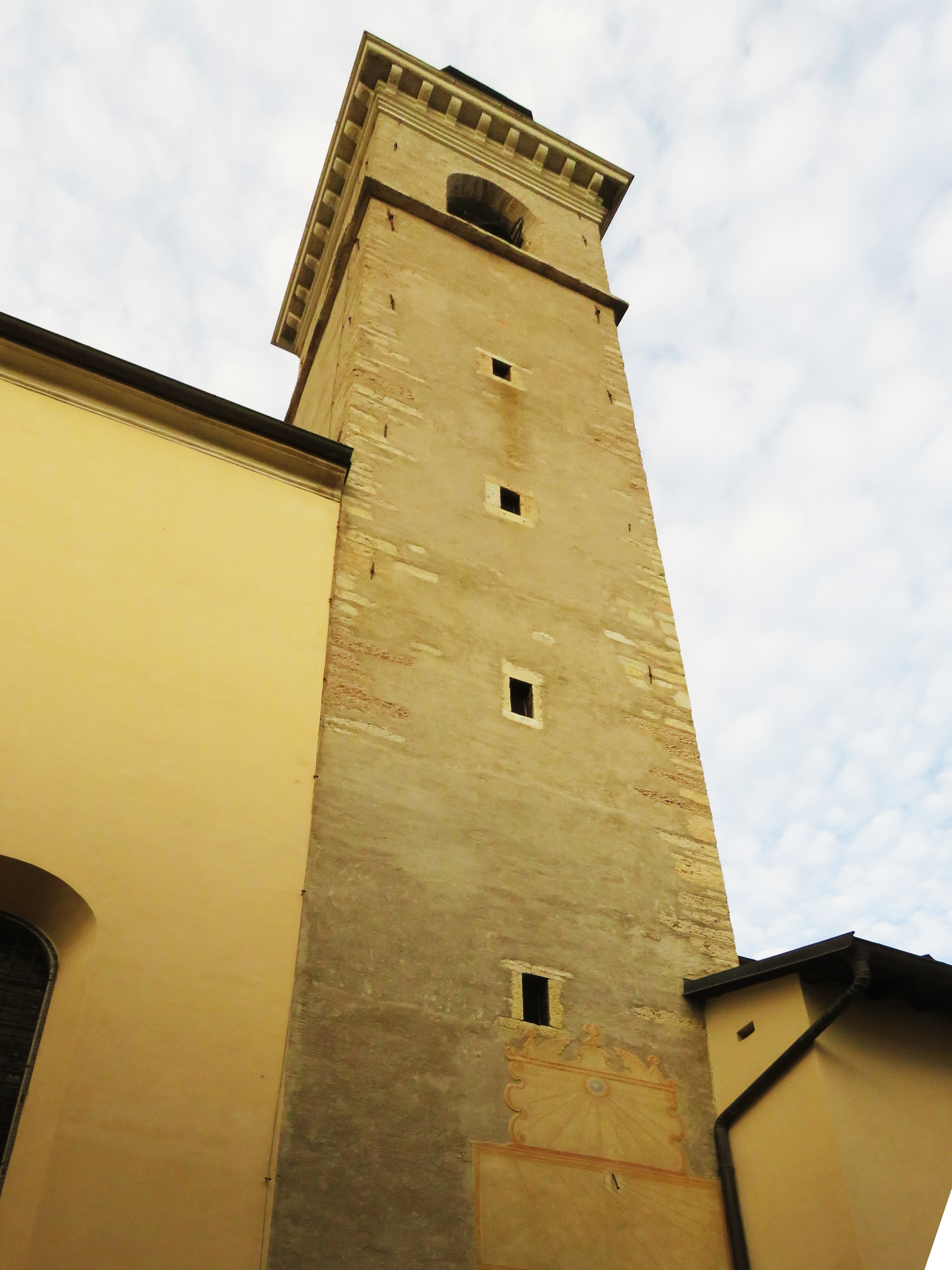 Campanile dal vicolo di san Giuseppe, accanto alla chiesa